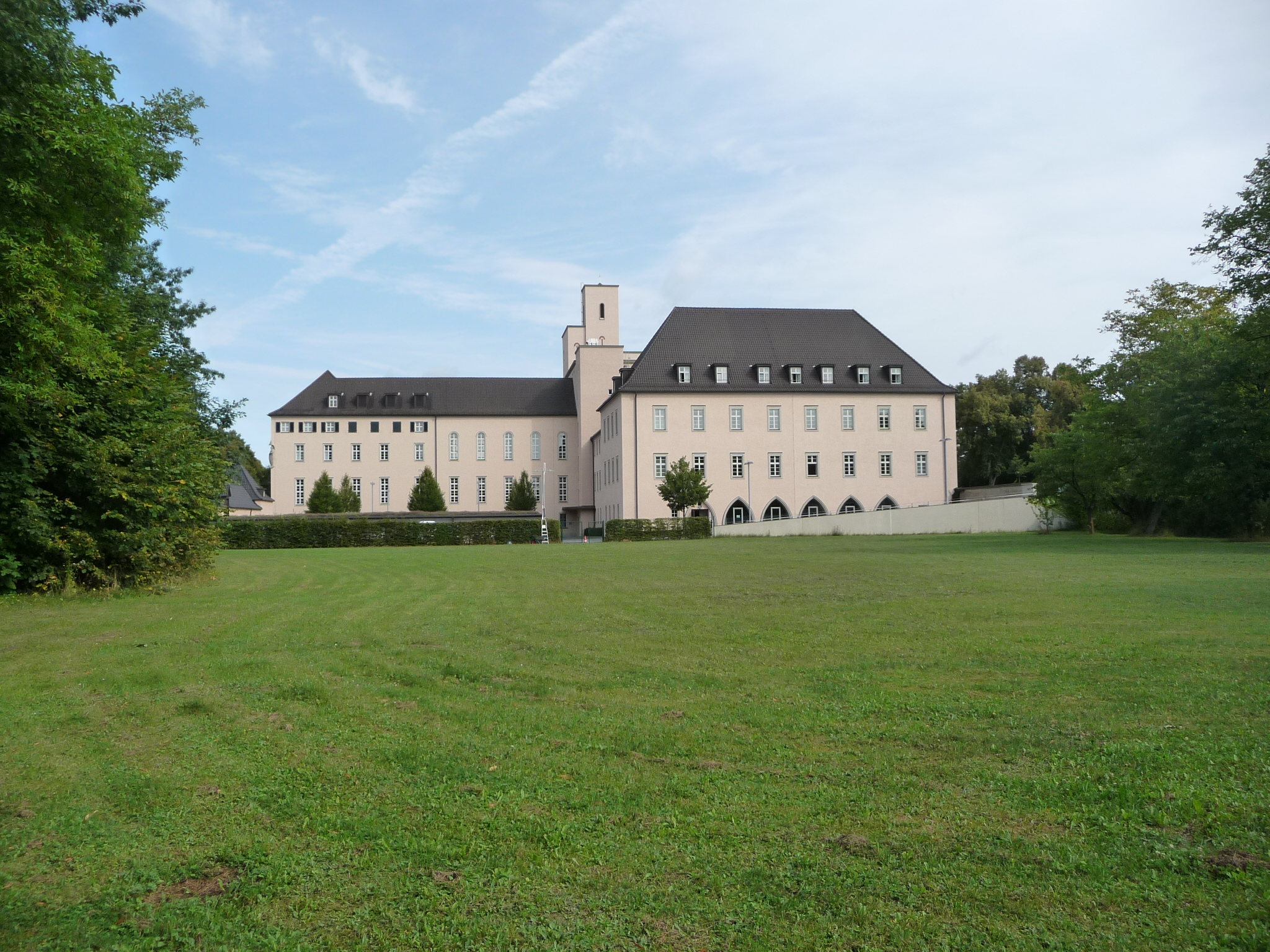 ehemaliges Priesterseminar, heute katholisches Bistumshaus in Bamberg, Oberfranken